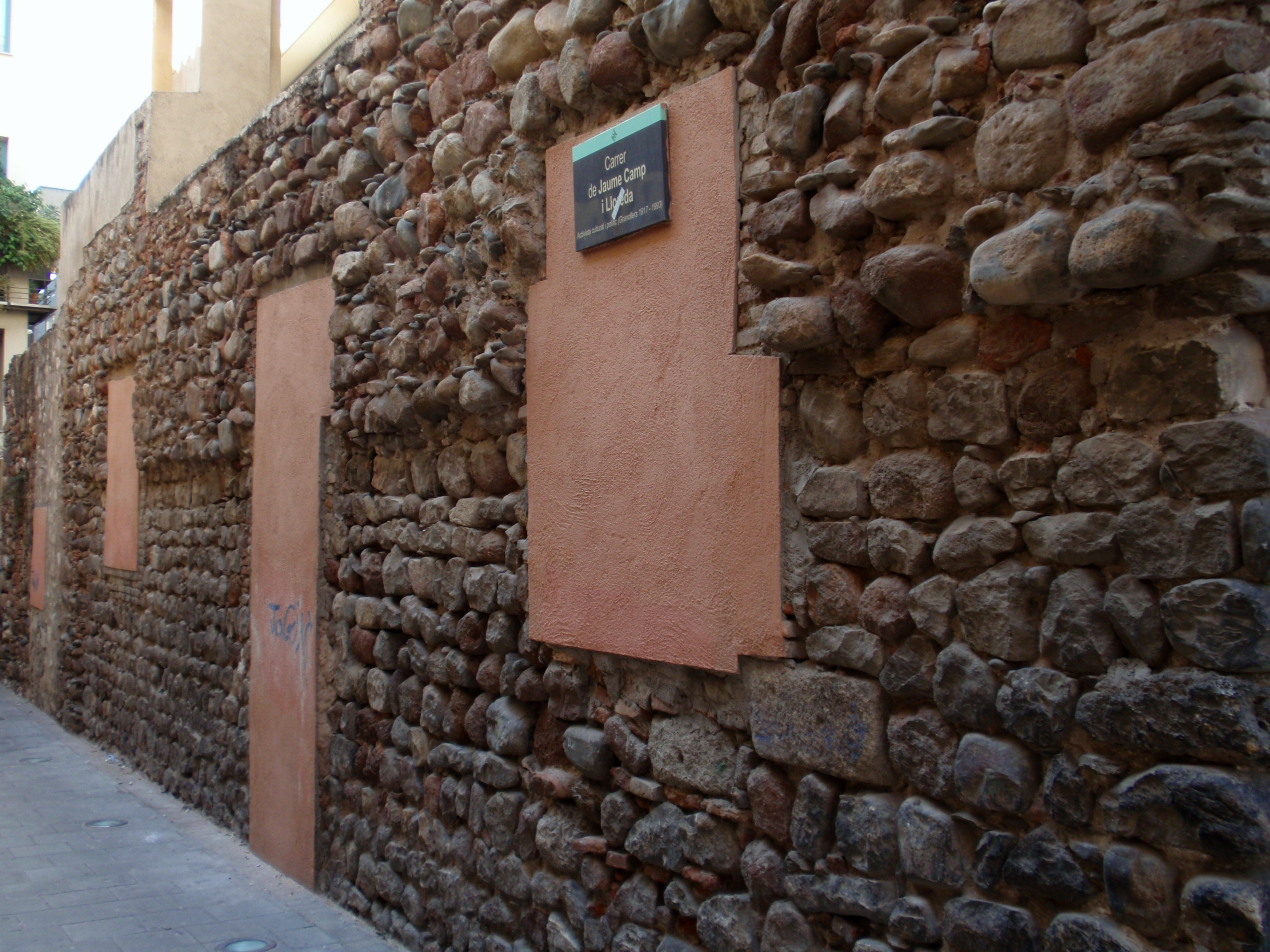 Restes del recinte emmurallat al carrer de Jaume Camp i Lloreda (antic carrer de la Constància) (Granollers).